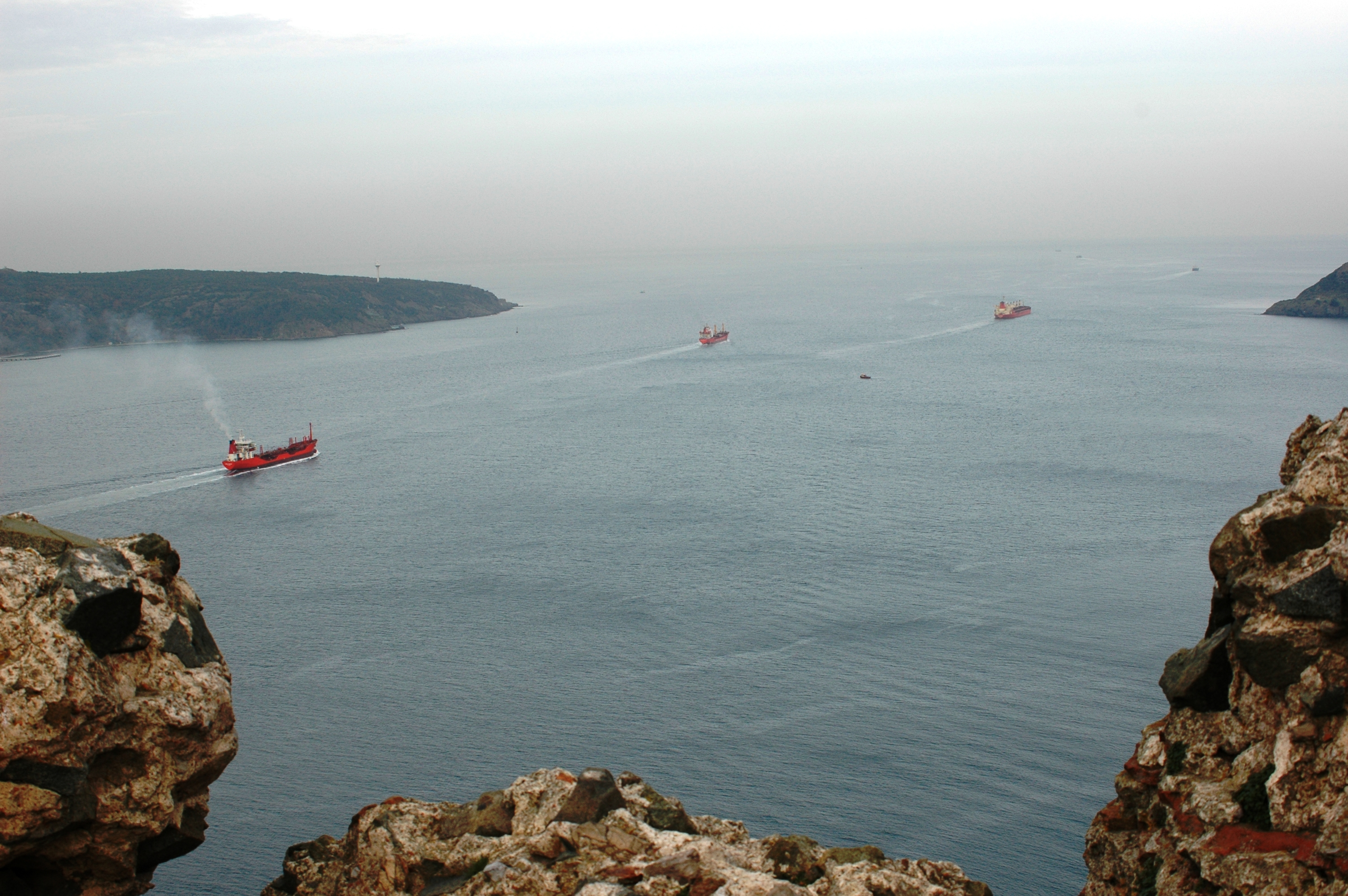 Castell de Yoros - Bòsfor i mar Negra